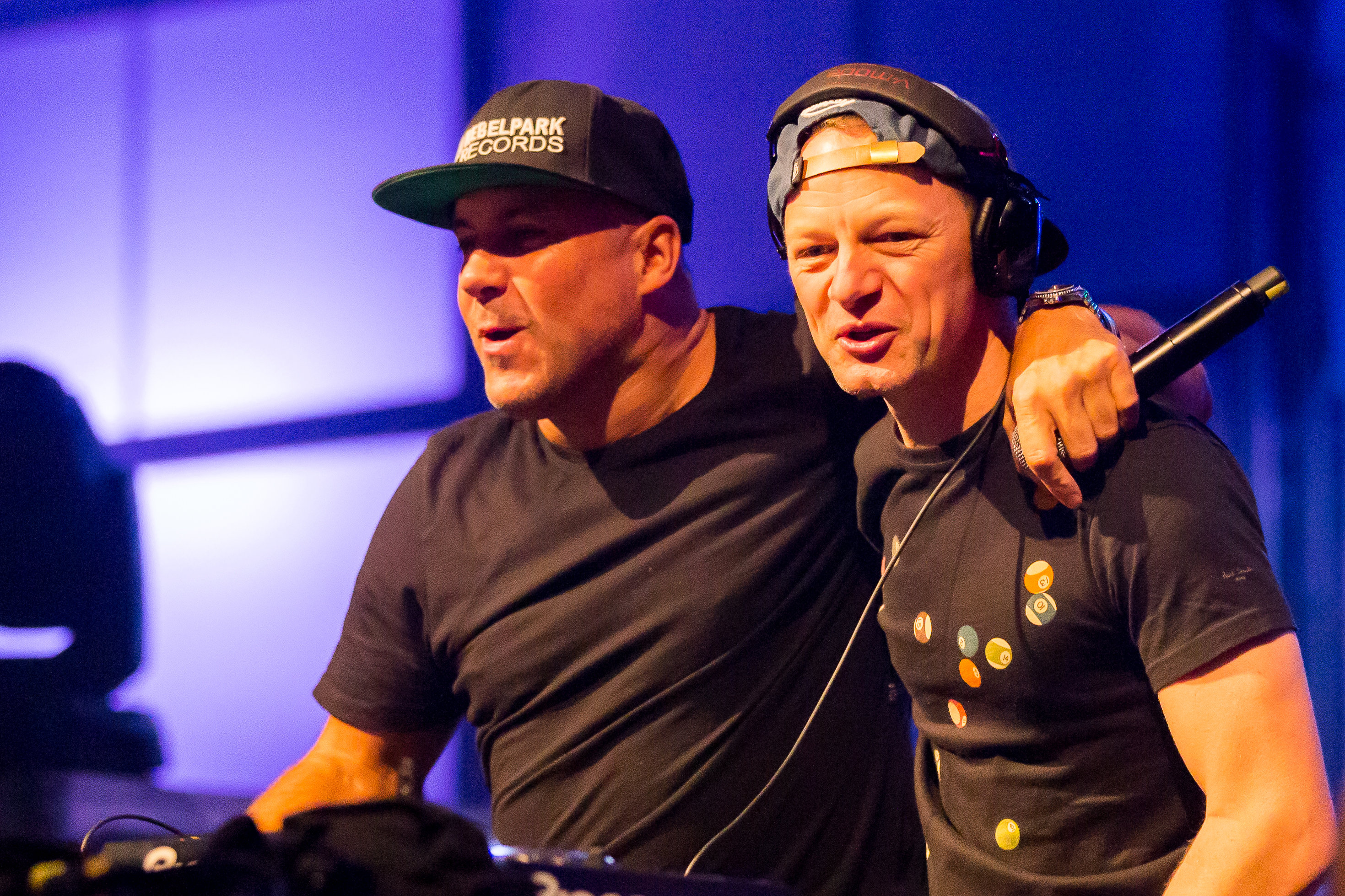 Charlie Lownoise & Mental Theo during sunshine live "Die 90er - Live on Stage" at Maimarkt Halle, Mannheim, Baden-Württemberg, Germany on 2015-11-29, Photo: Sven Mandel